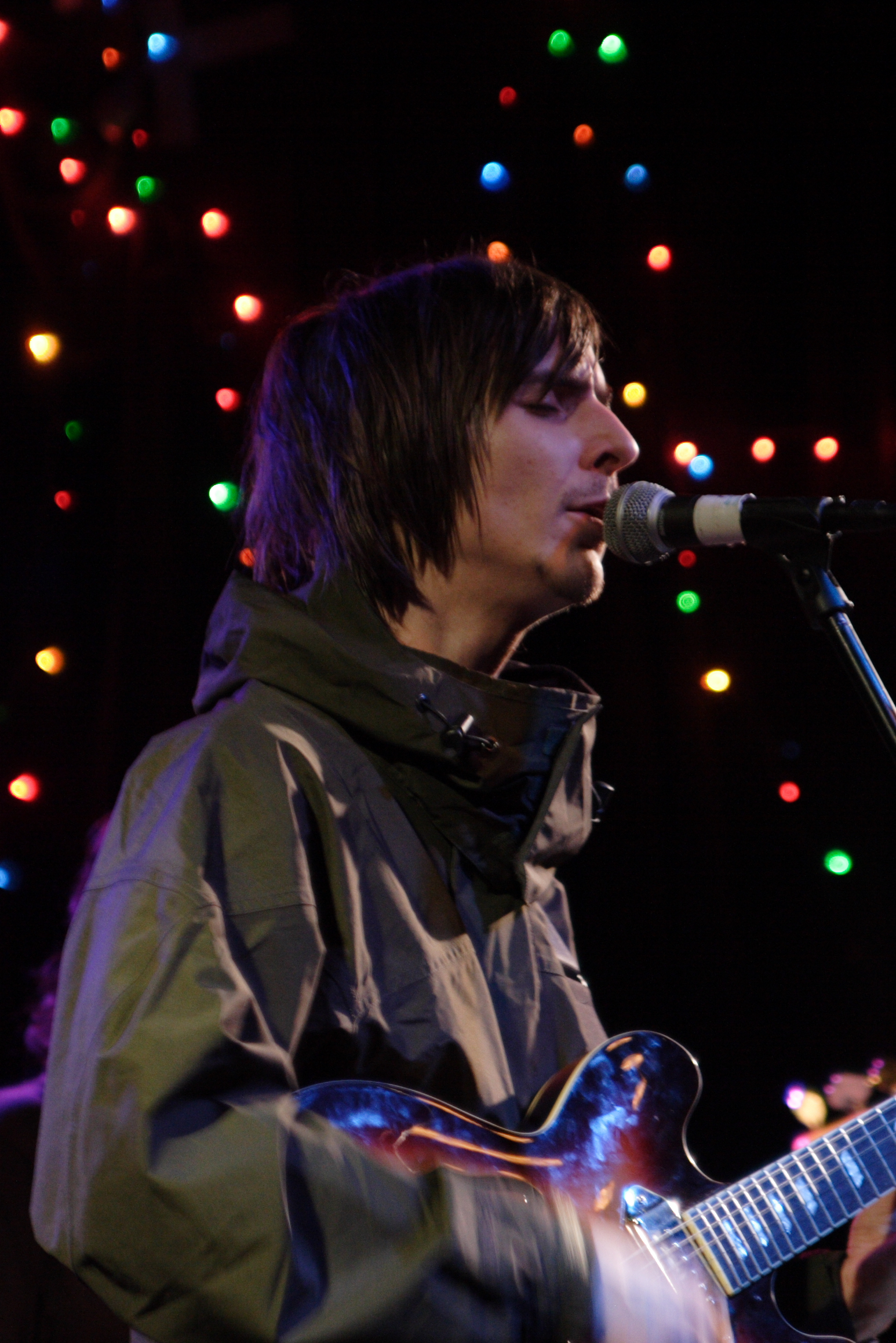 Manchester singer/songwriter Jim Noir.